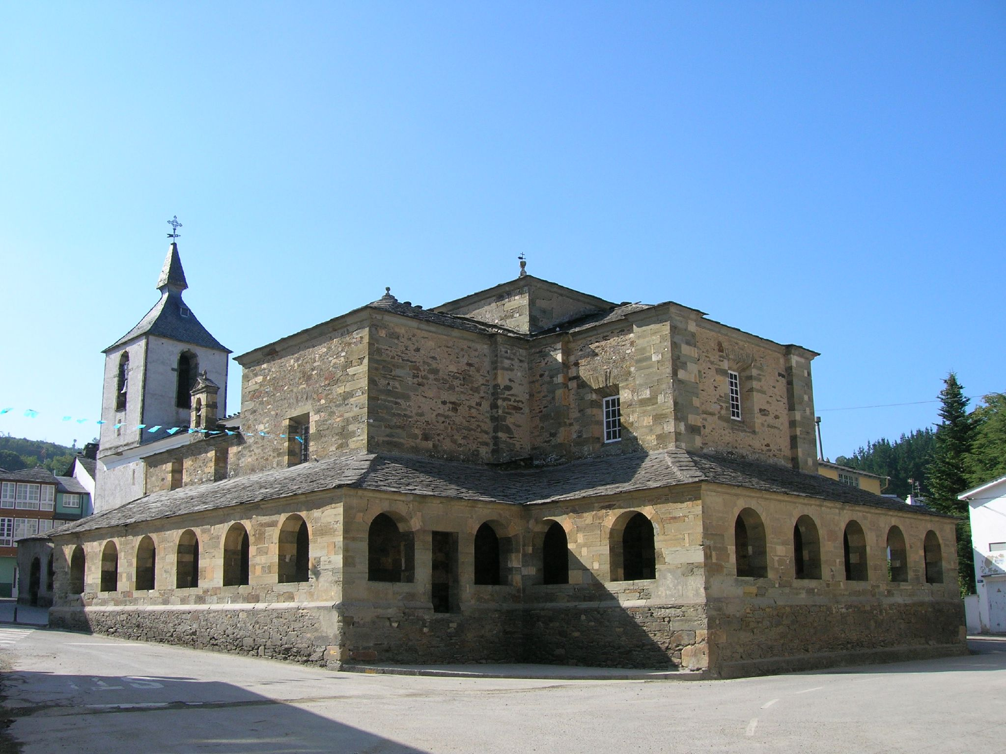 Iglesia de San Salvador de Grandas de Salime